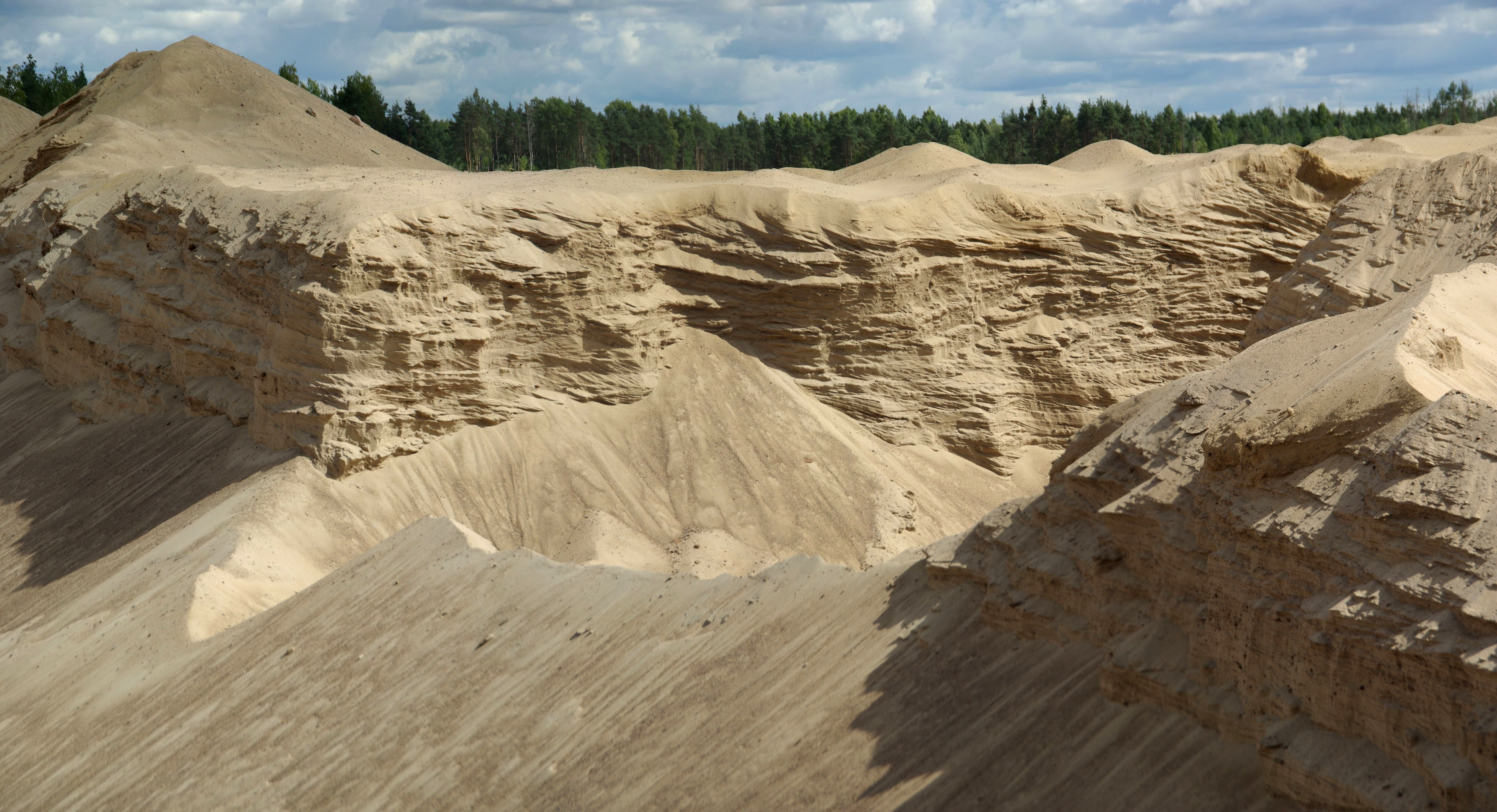 on karjäär Harjumaal, Saku vallas, Tammemäe külas